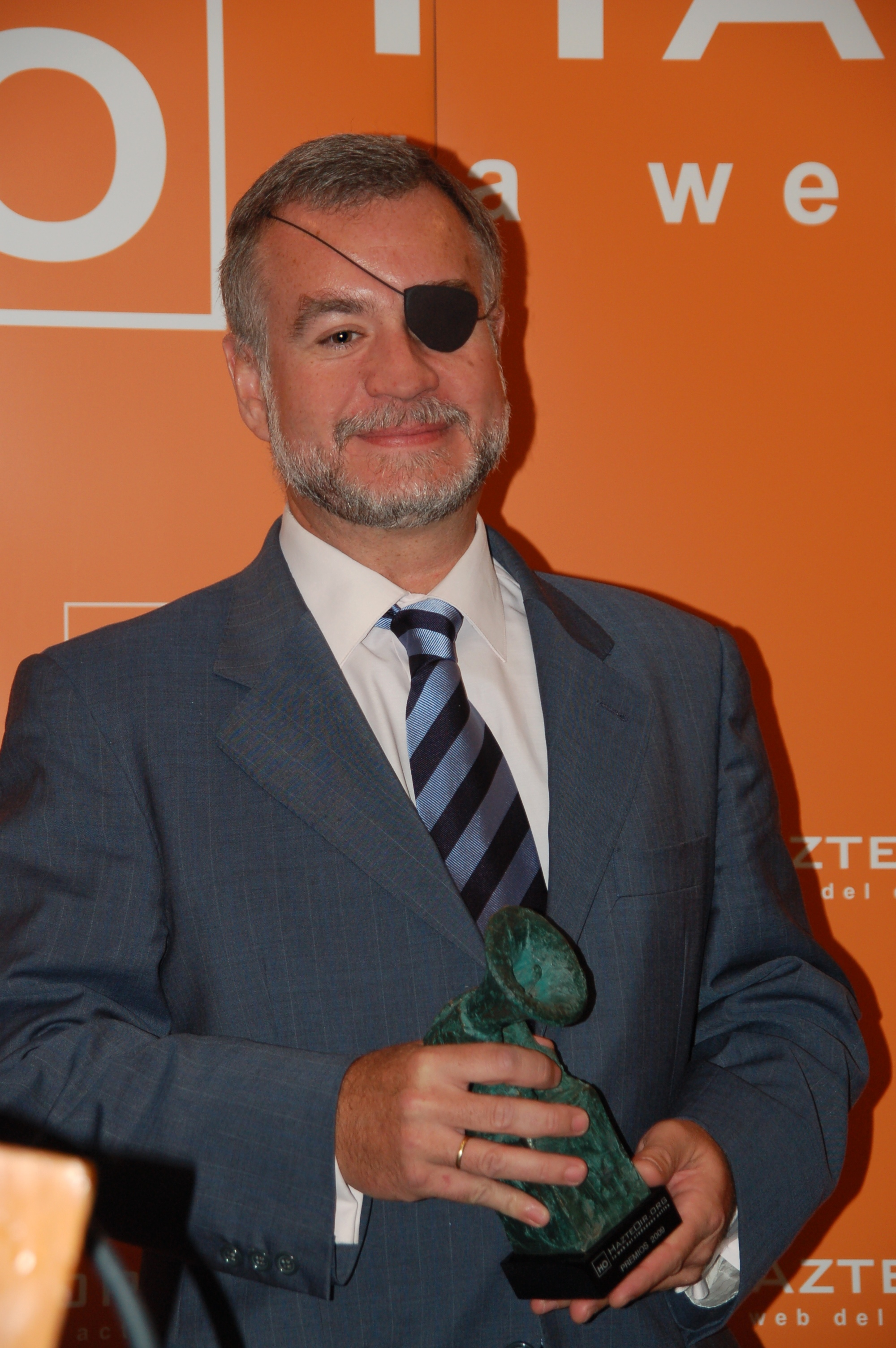 Entrega de los Premios HO 2009 en el Hotel NH Eurobuilding de Madrid